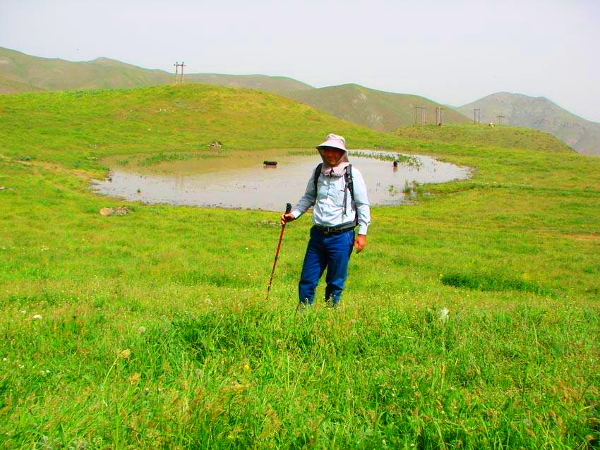 برکه قالغانلو در روستای خان کندی گرمی سال 1394